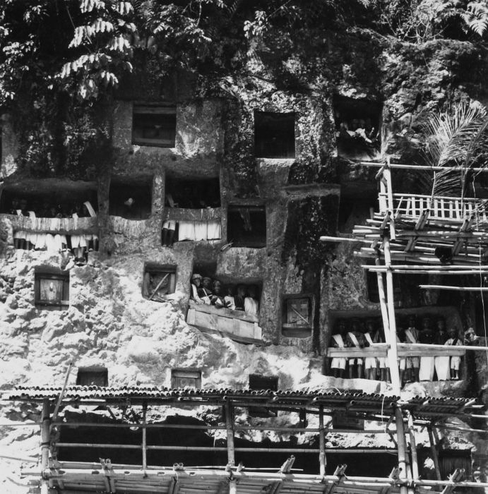 Negatief. De tau-tau is een pop die de overledene voorstelt. De steigers zijn geplaatst voor de steenhouwers die nieuwe graven uithakken.. Rotsgraven met tau-tau en steigers nabij het dorp Lemo